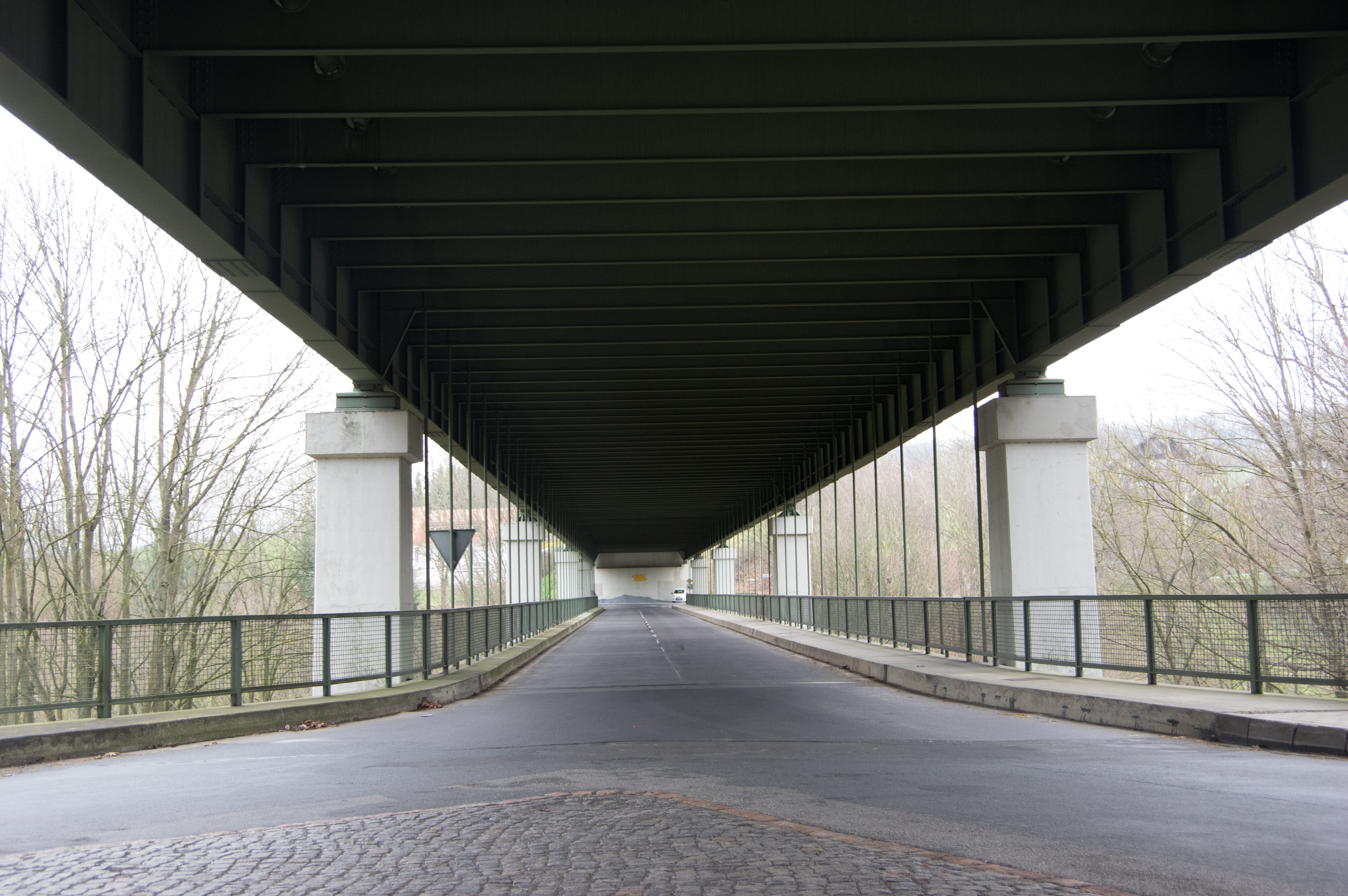 Einbeck, Ortsteil Kuventhal in Niedersachsen. Die Brücke steht unter Denkmalschutz. Sie führt über die Bundesstraße 3.